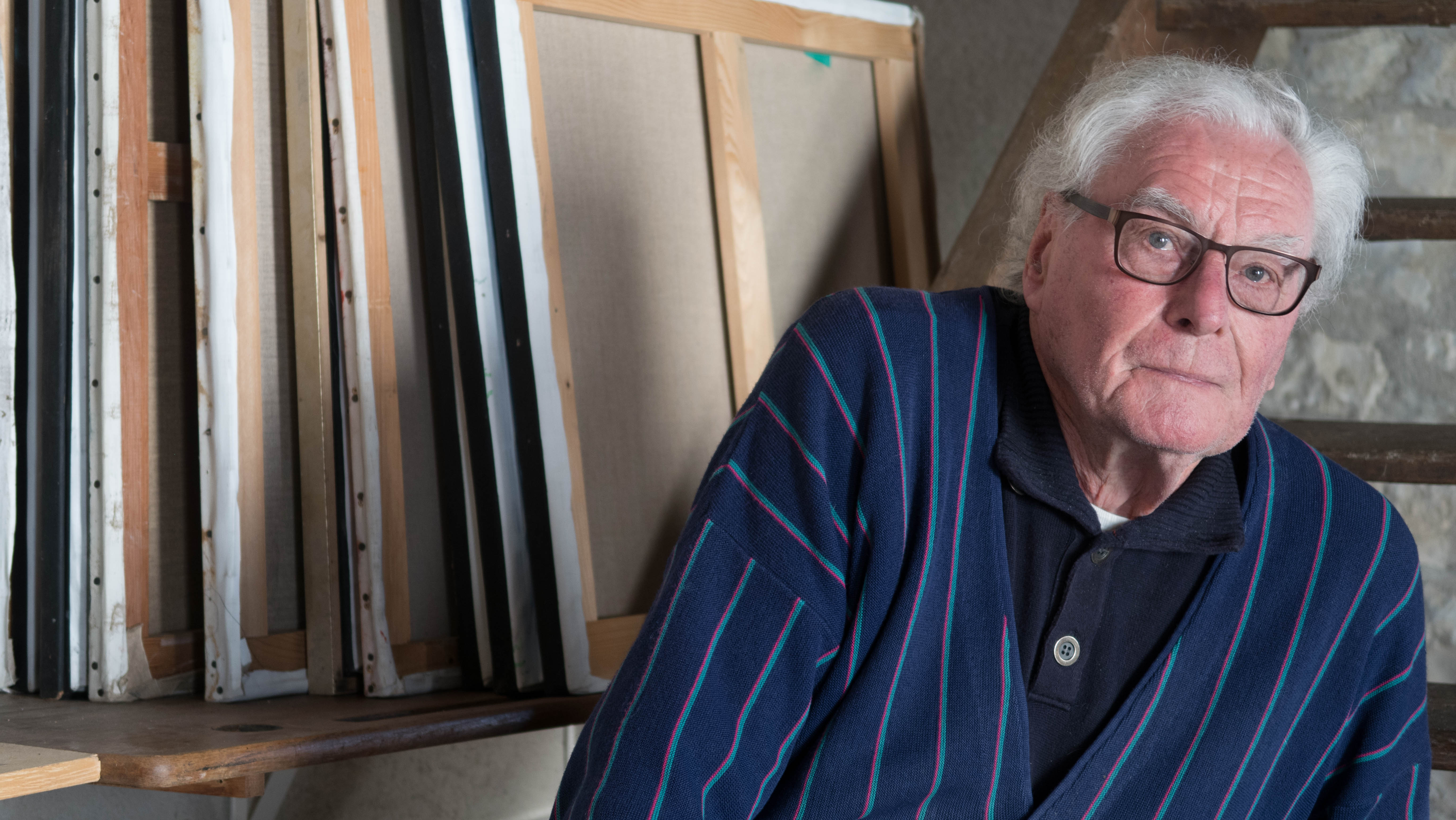 portrait